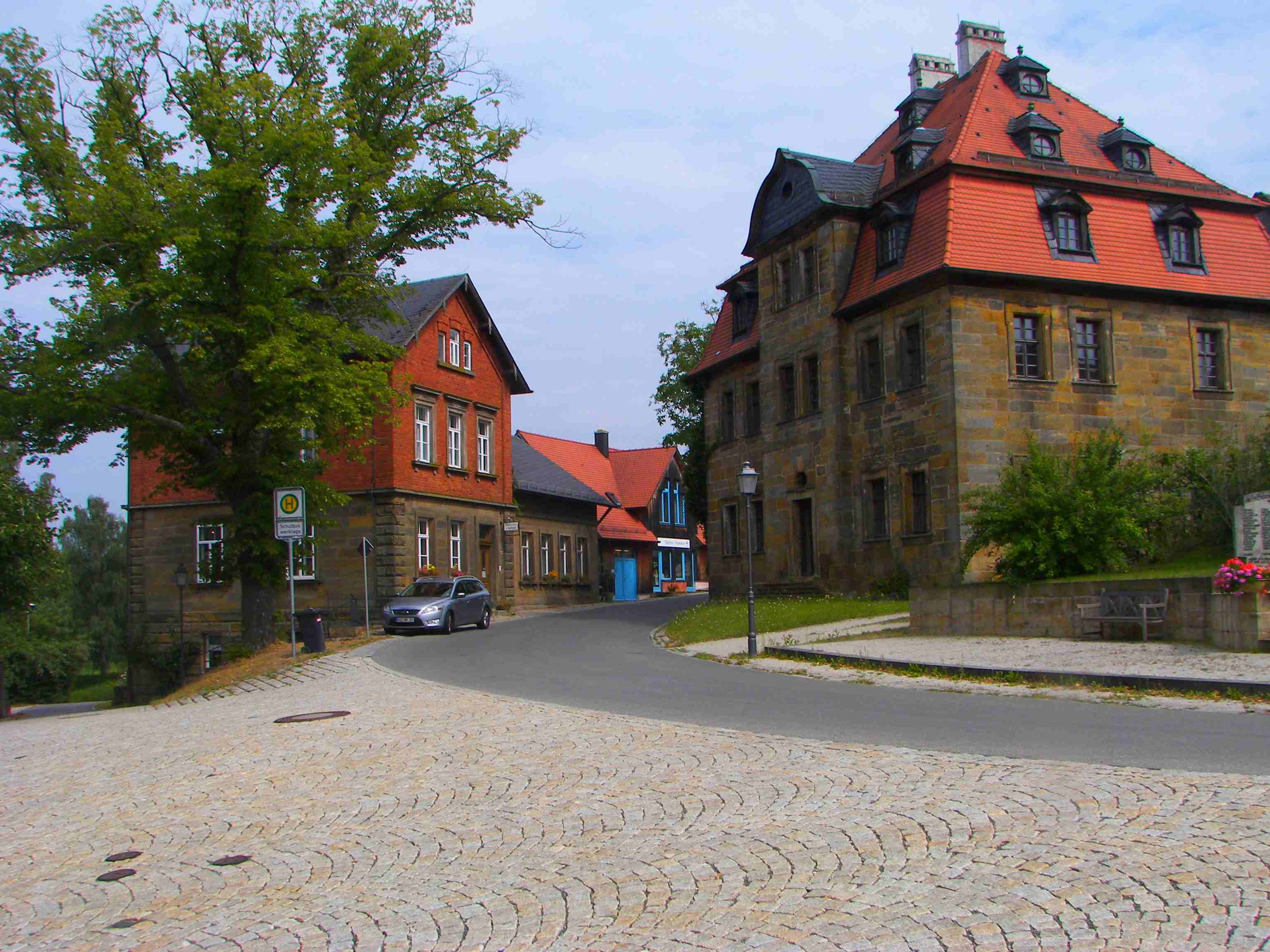 Peesten, Schloss, Schulhaus und Töpferei